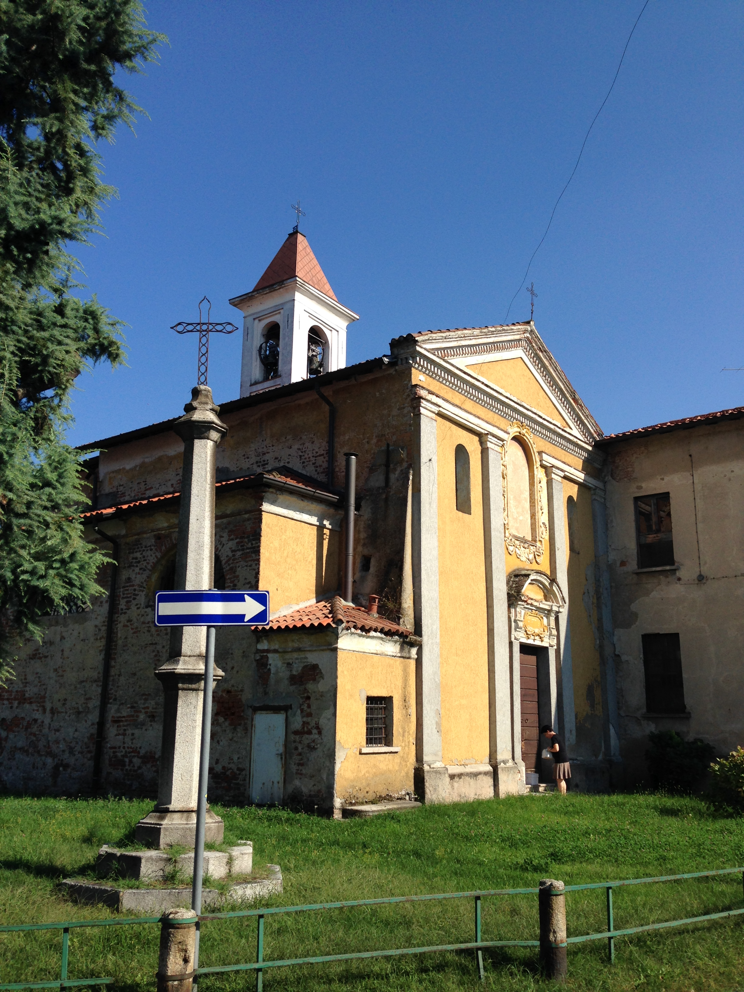 Zibido San Giacomo - Chiesa Parocchia